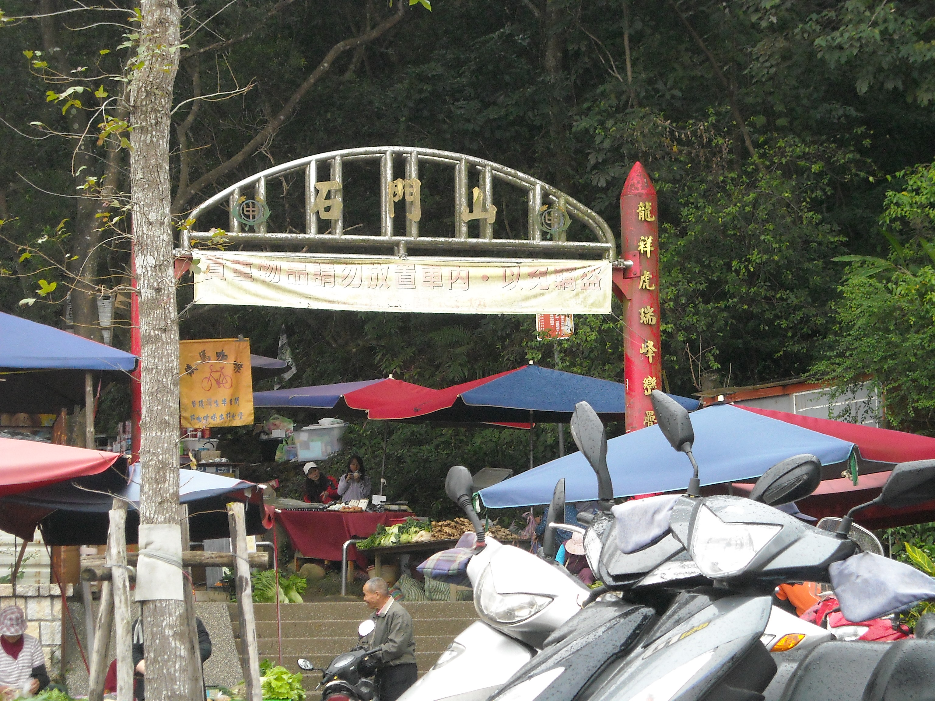 桃園縣石門山步道